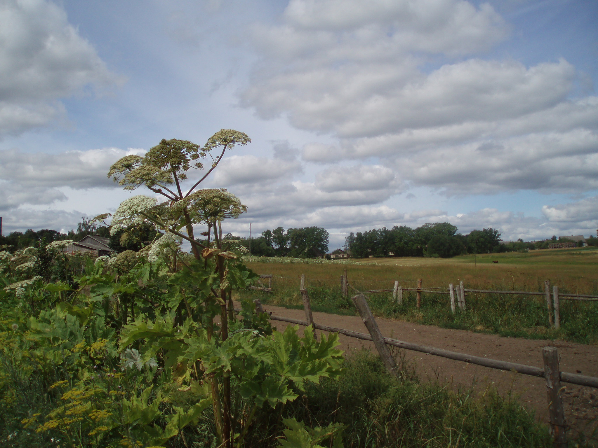 Sosnovska LatvÄ nis (Heracleum sosnowky) Foto - Modris Frikmanis.